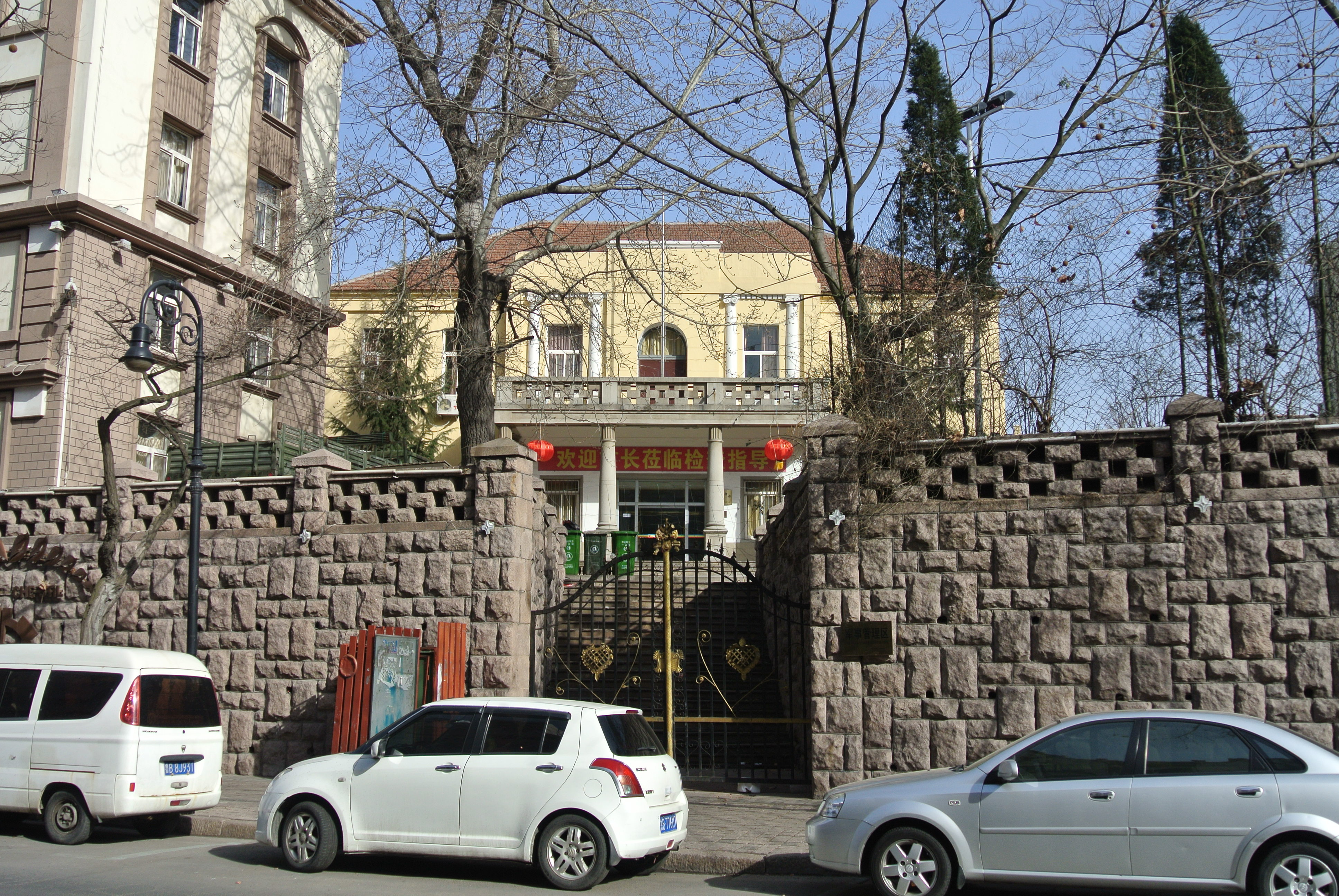 青岛齐燕会馆旧址